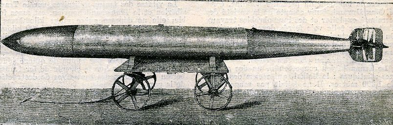 Torpille Schwartzkopff adoptée par la marine russe